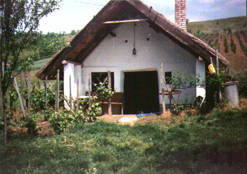 Tényő település szölőhegye